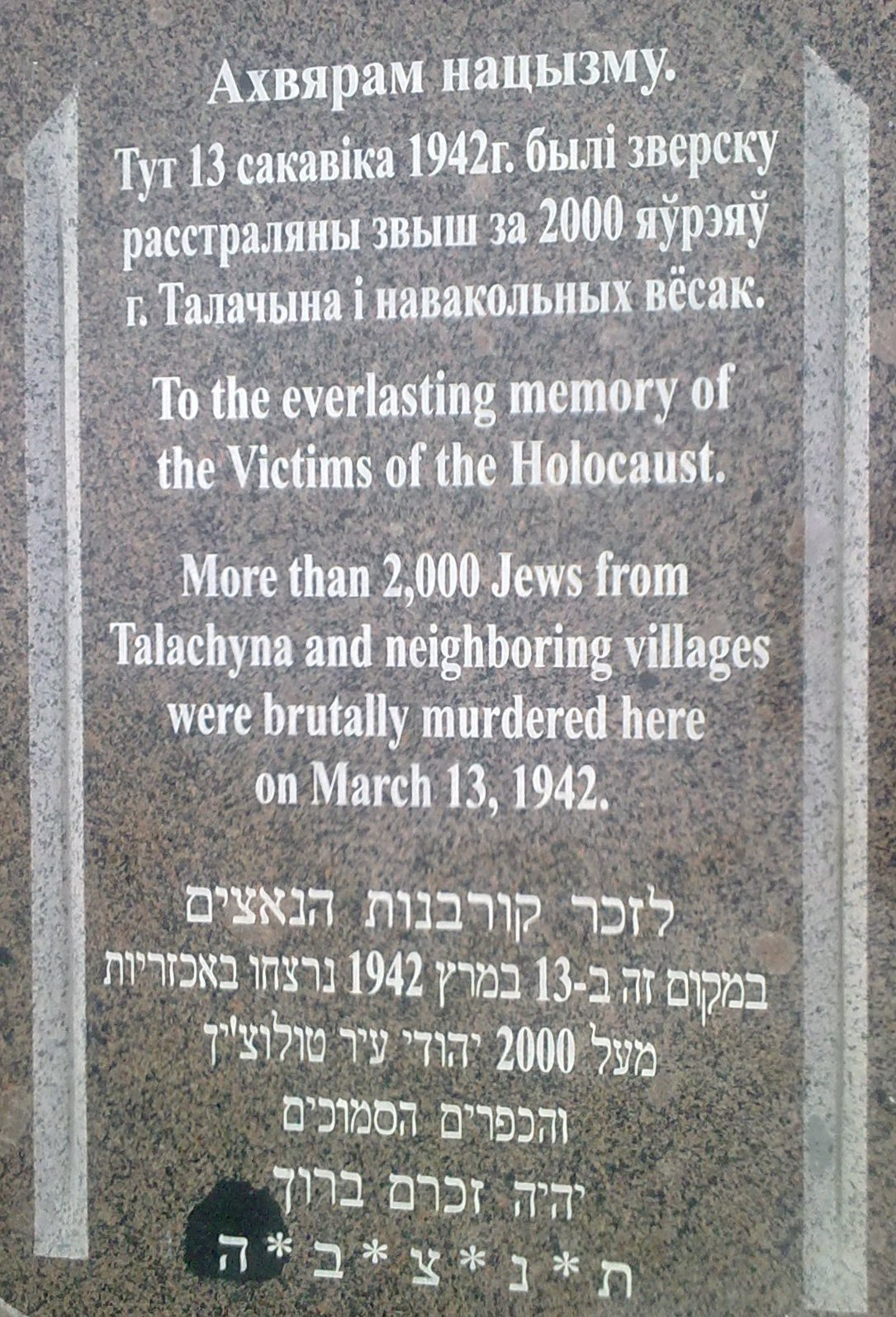 Новый памятник на месте расстрела евреев Толочина в марте 1942 года. Установлен в 2012 году.